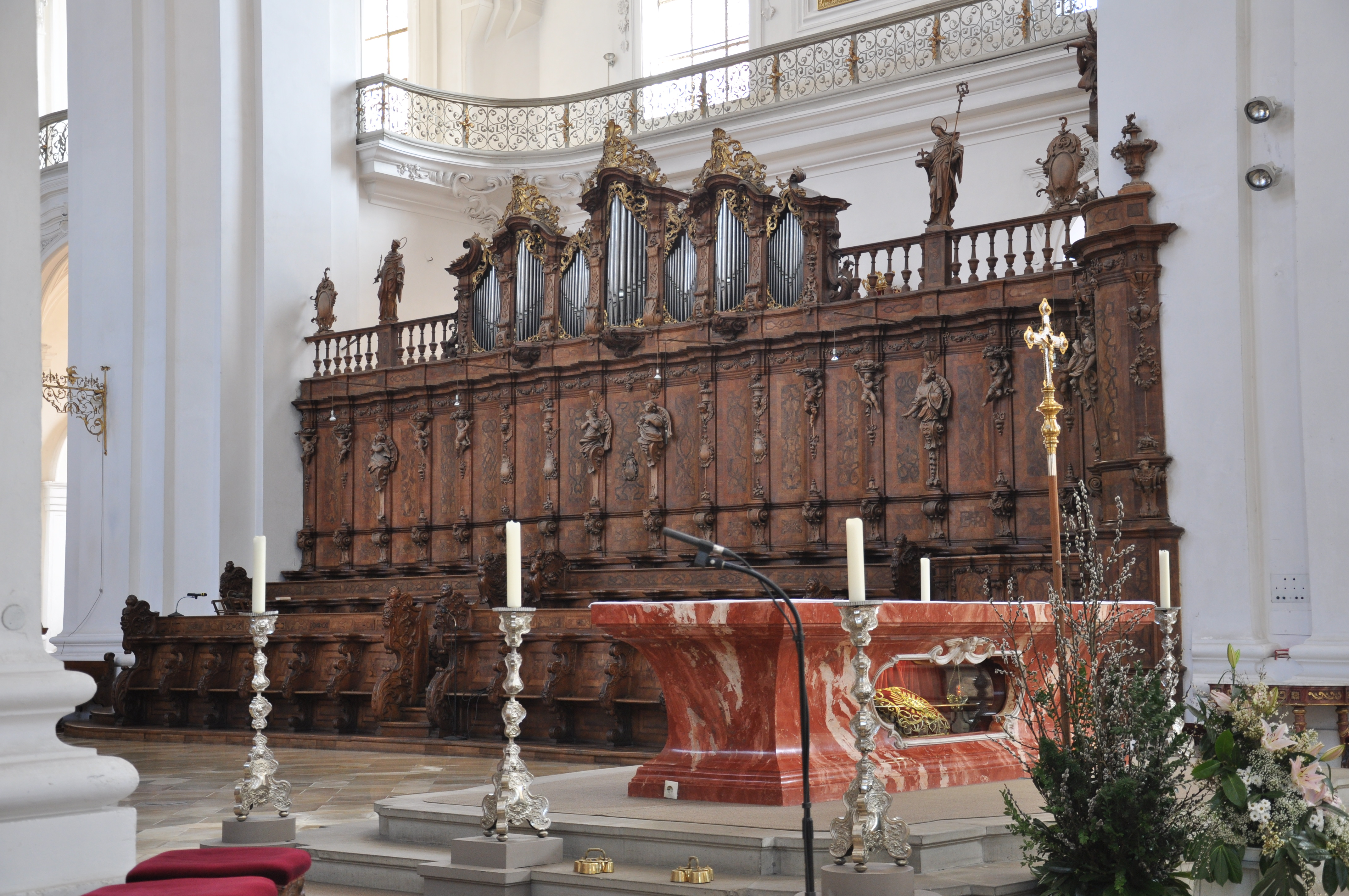 Chorgestühl der Basilika St. Martin und Oswald in Weingarten (Württemberg) von Joseph Anton Feuchtmayer; mit der von Joseph Gabler erweiterten Chororgel.